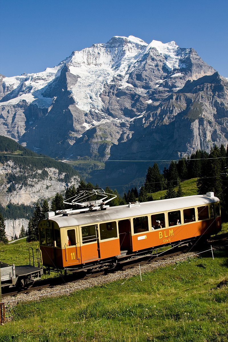 Mürrenbahn vor der Jungfrau